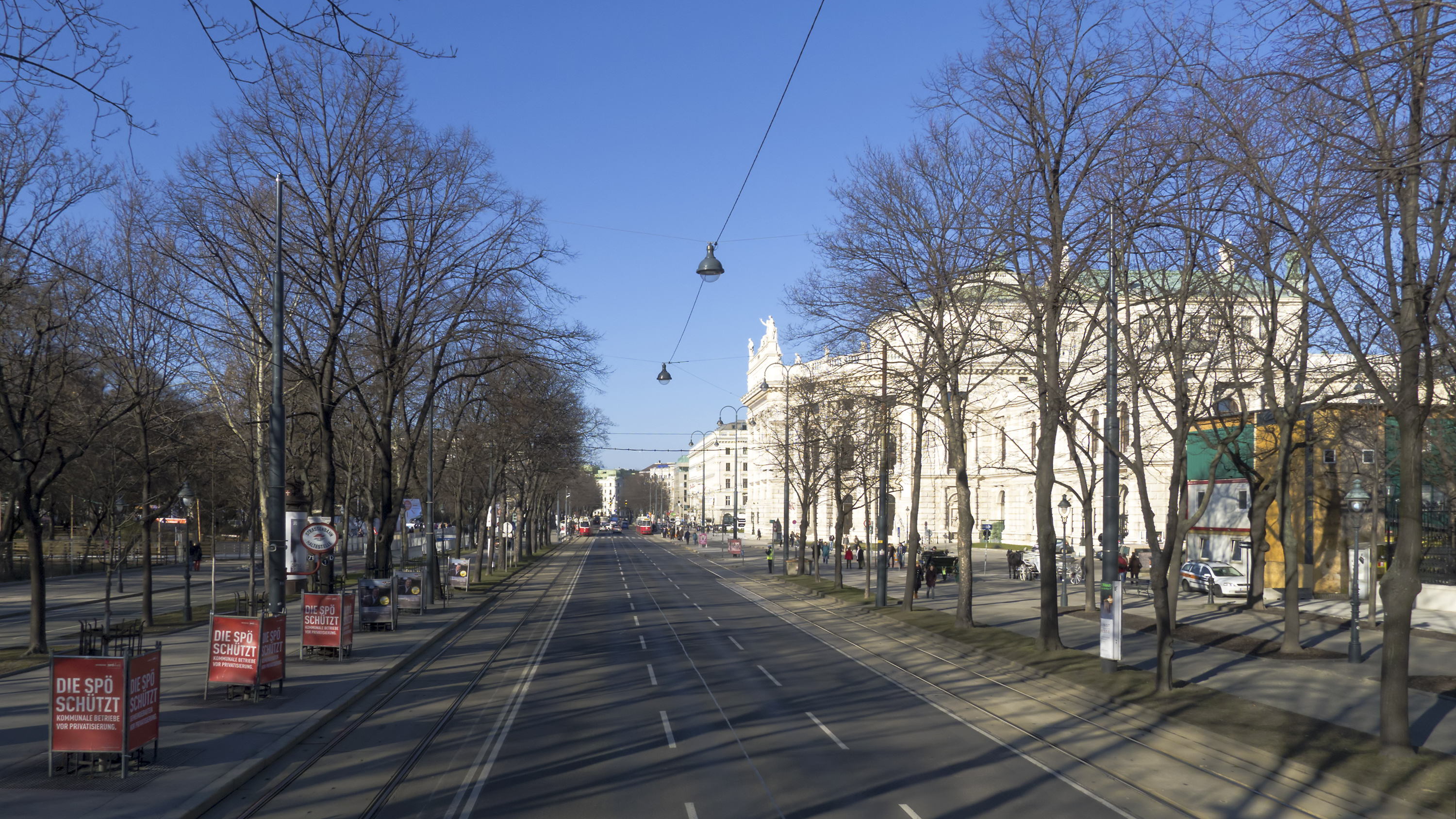 Universitätsring in Wien 1 Richtung Norden